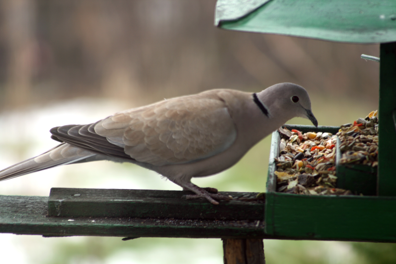 Streptopelia decaocto, Jaroměř, East Bohemia Hrdlička zahradní, Jaroměř, východní Čechy January 2008 Author= Karelj